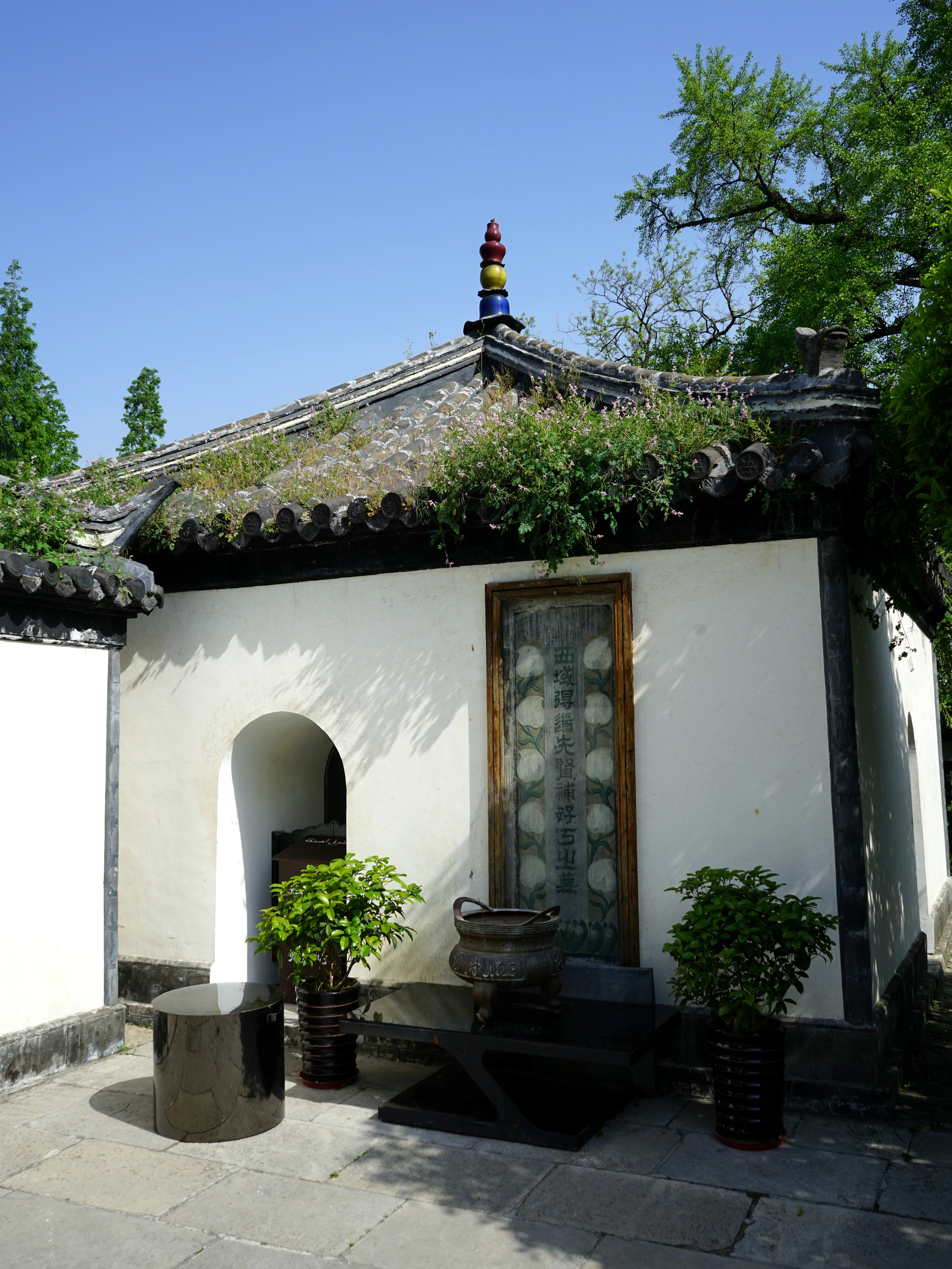 中文（中国大陆）: 普哈丁墓。